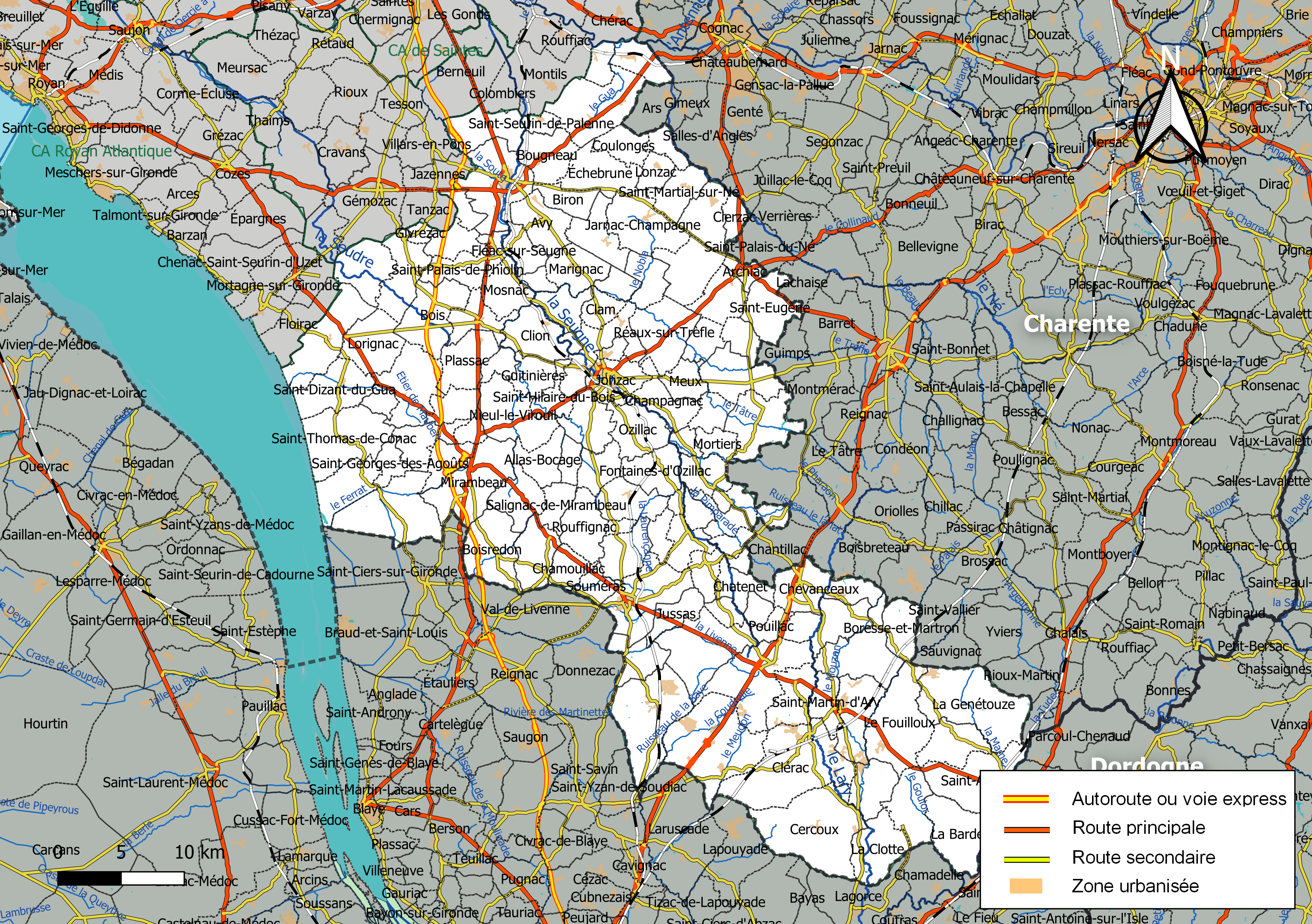 Carte géographique de la Communauté de communes de la Haute Saintonge, département de la Charente-Maritime, France. Composition au 1er janvier 2019.